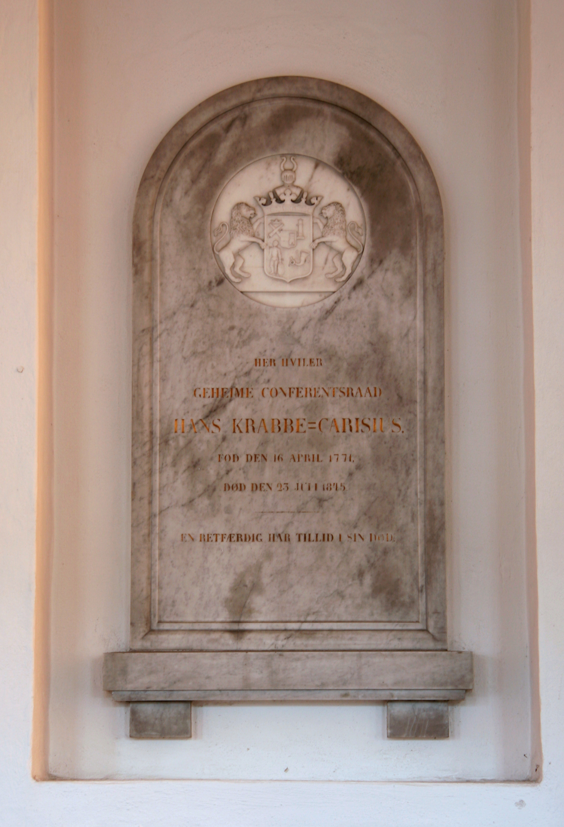 Holmens Kirke, Copenhagen, Denmark . Hans Krabbe-Carisius' epitafium i store kapel. 1845.